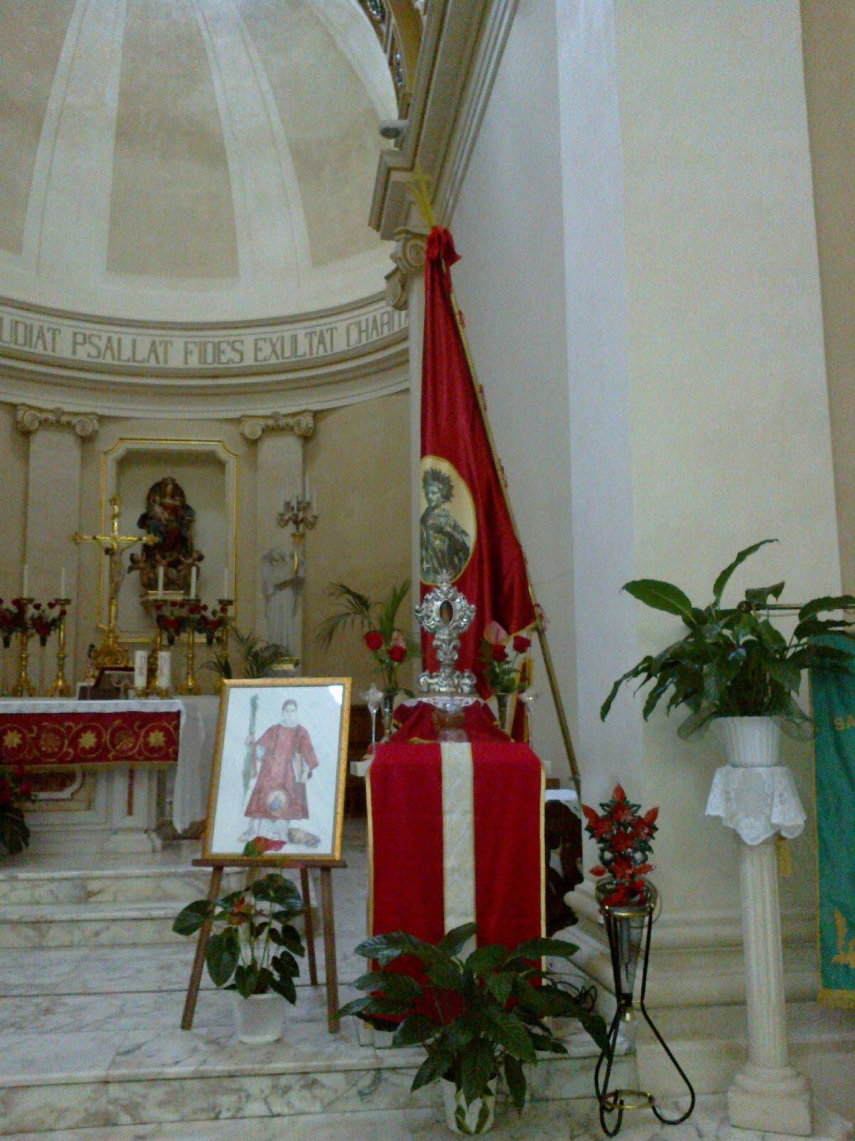 Esposizione del reliquiario ad ostensorio in argento di San Cesario diacono e martire, Parrocchia Santa Maria delle Grazie in San Cesario di Lecce, 13 novembre 2016